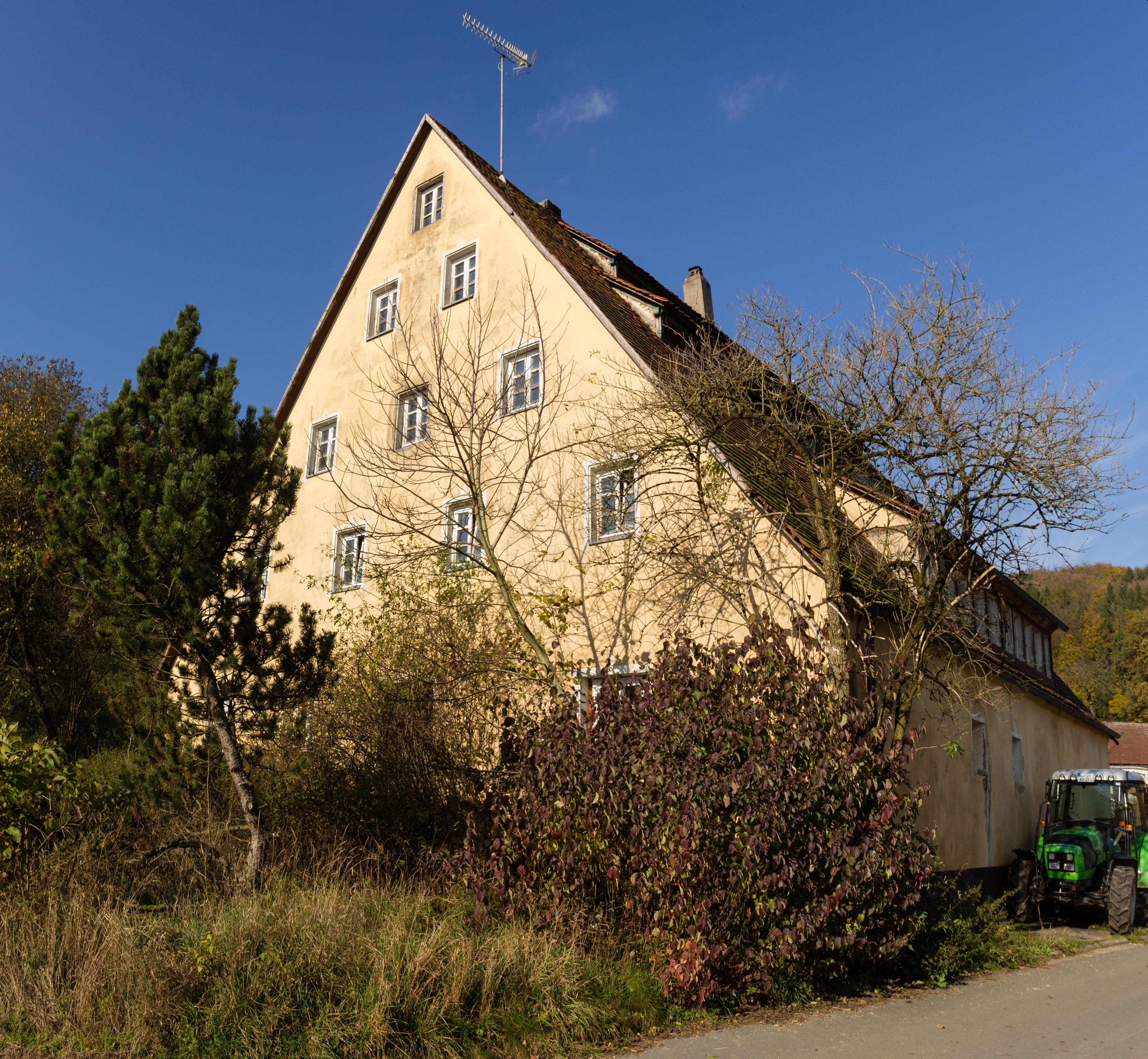 Adelheim, Altdorf, Hopfenbauernhaus, Eingeschossiger massiver Steildachbau mit Hopfenluken, Mitte 19. Jahrhundert